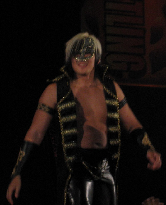 2011年11月12日 大阪大会 「PUWER STRUGGLE」 タイチ